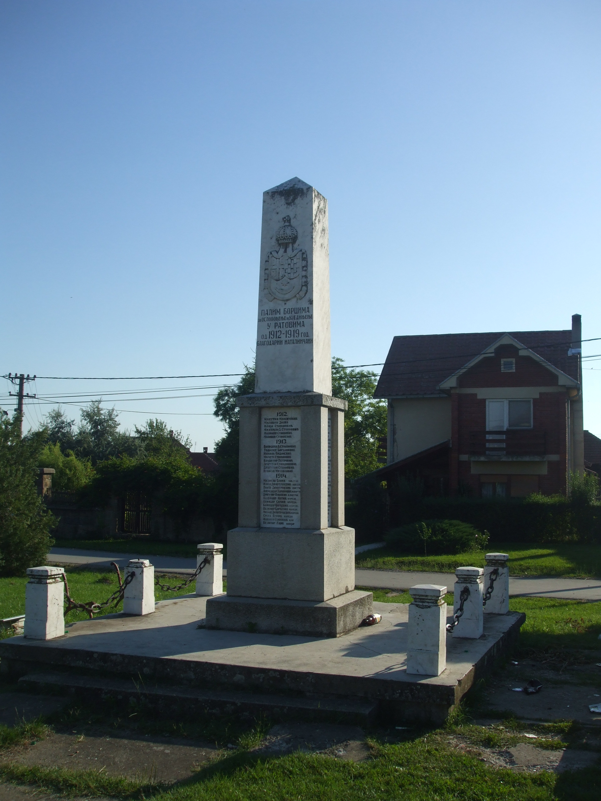 Spomenik iz I svetskog rata u Natalincima.